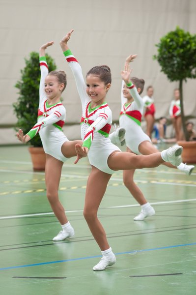 Sportaerobic Trio der Altersklasse 12-14